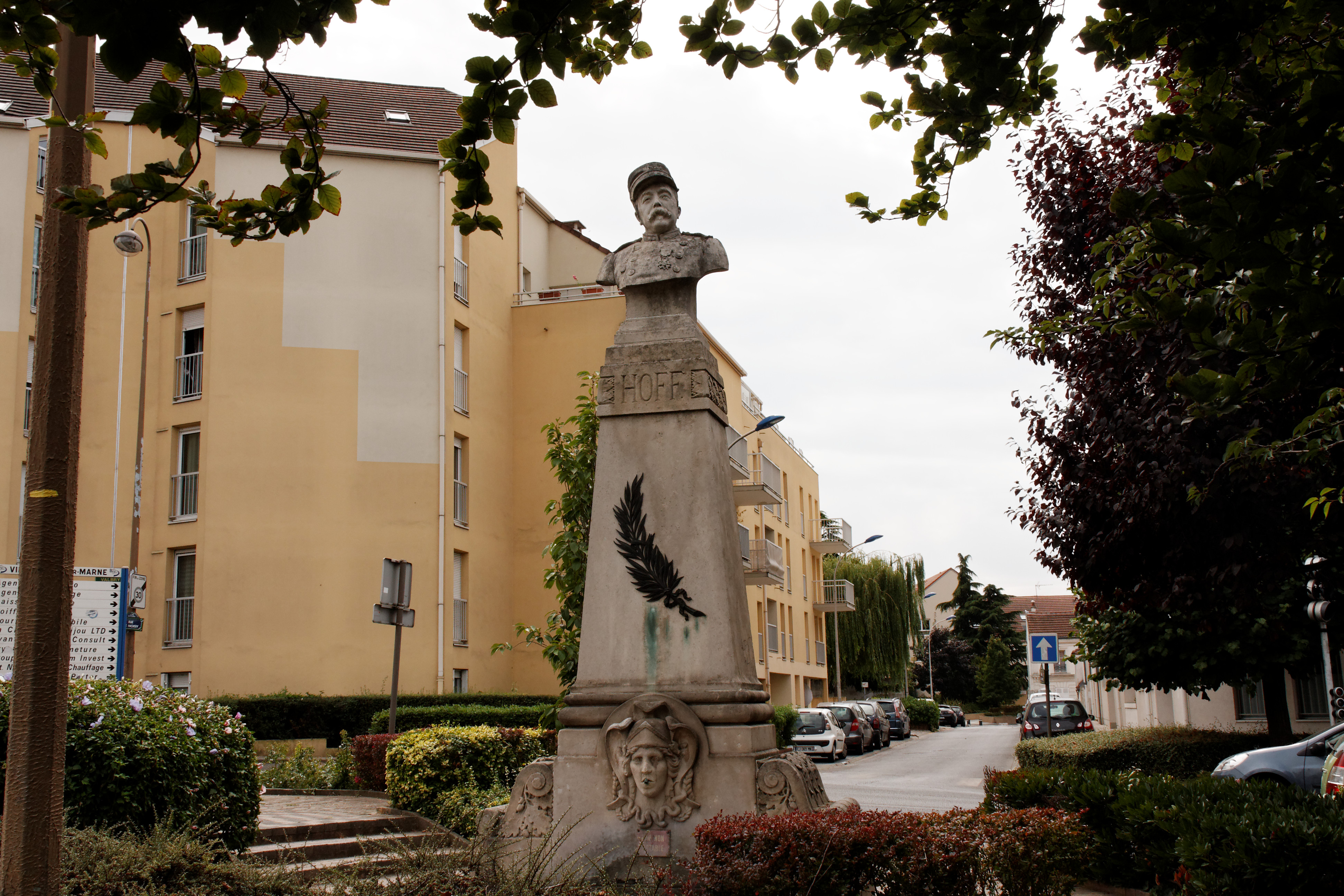 Monument commémoratif du sergent Ignace Hoff, guerre de 1870-71, Vue générale